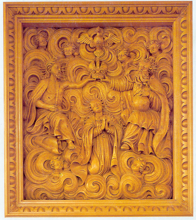 Lindenholzrelief aus dem 16. Jh. in der Ortskapelle St. Andreas in Deisendorf